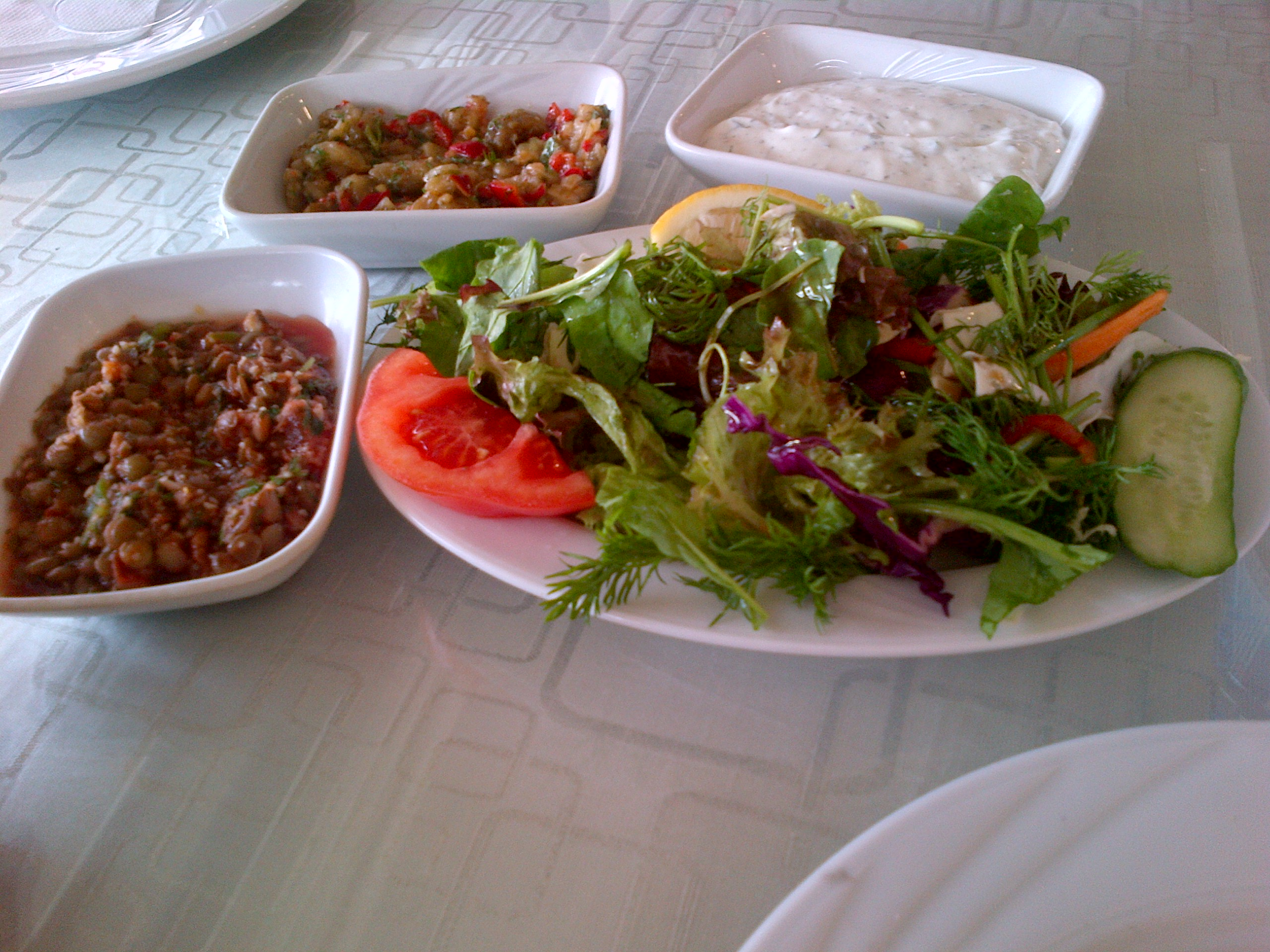 Una amanida i varies plats de meze de la cuina turca: Llenties verds (fred), amanida d'albergínia i "haydari".